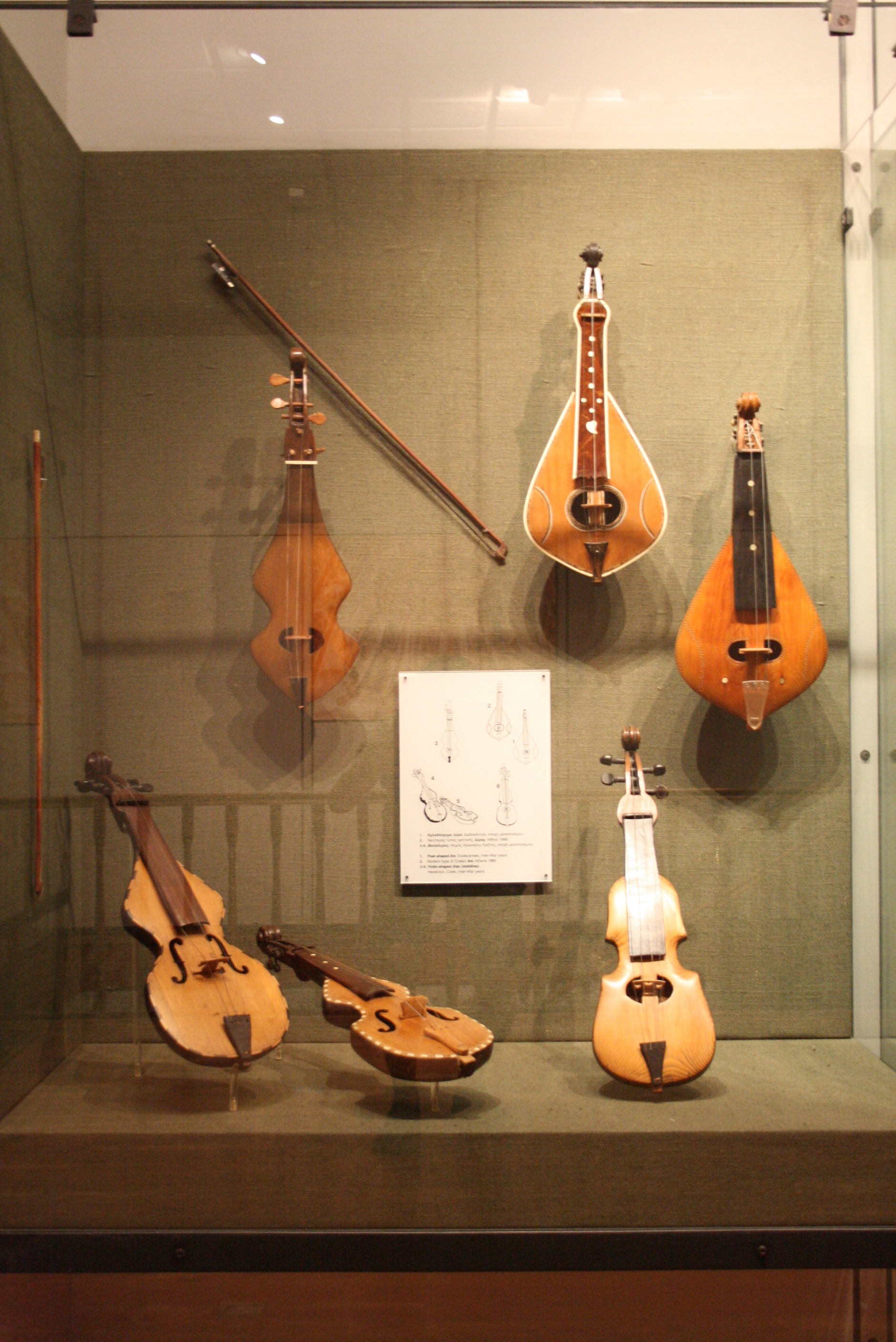 Lyres de Creta. Museu. Atenes